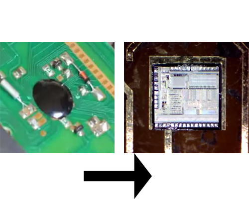 En una imagen se muestra un (COB) normal de un circuito impreso de bajo costo, en la otra se muestra el mismo sin su recubrimiento de resina epóxica, mostrando la pastilla u oblea semiconductora de su interior.